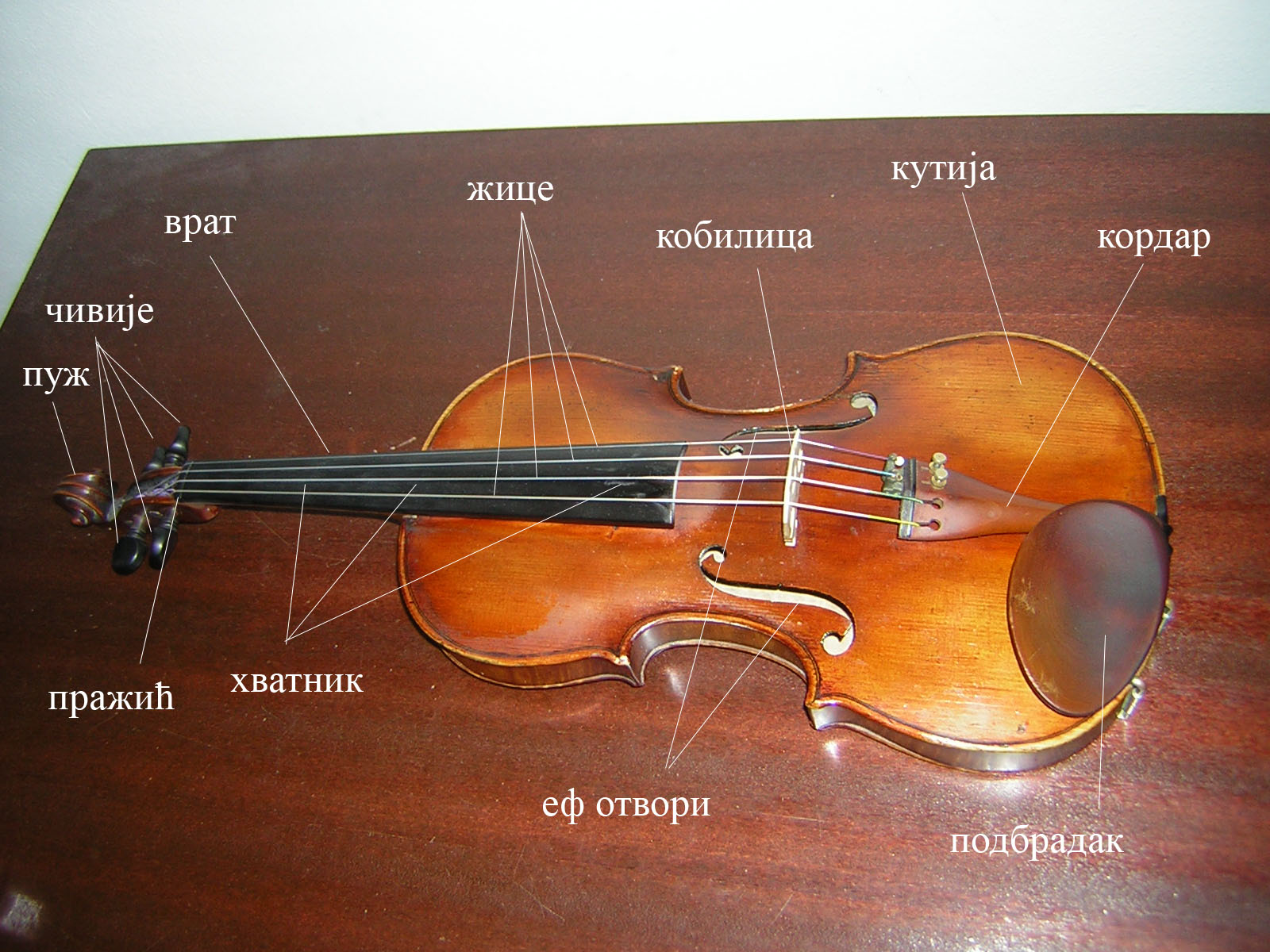 Делови виолине